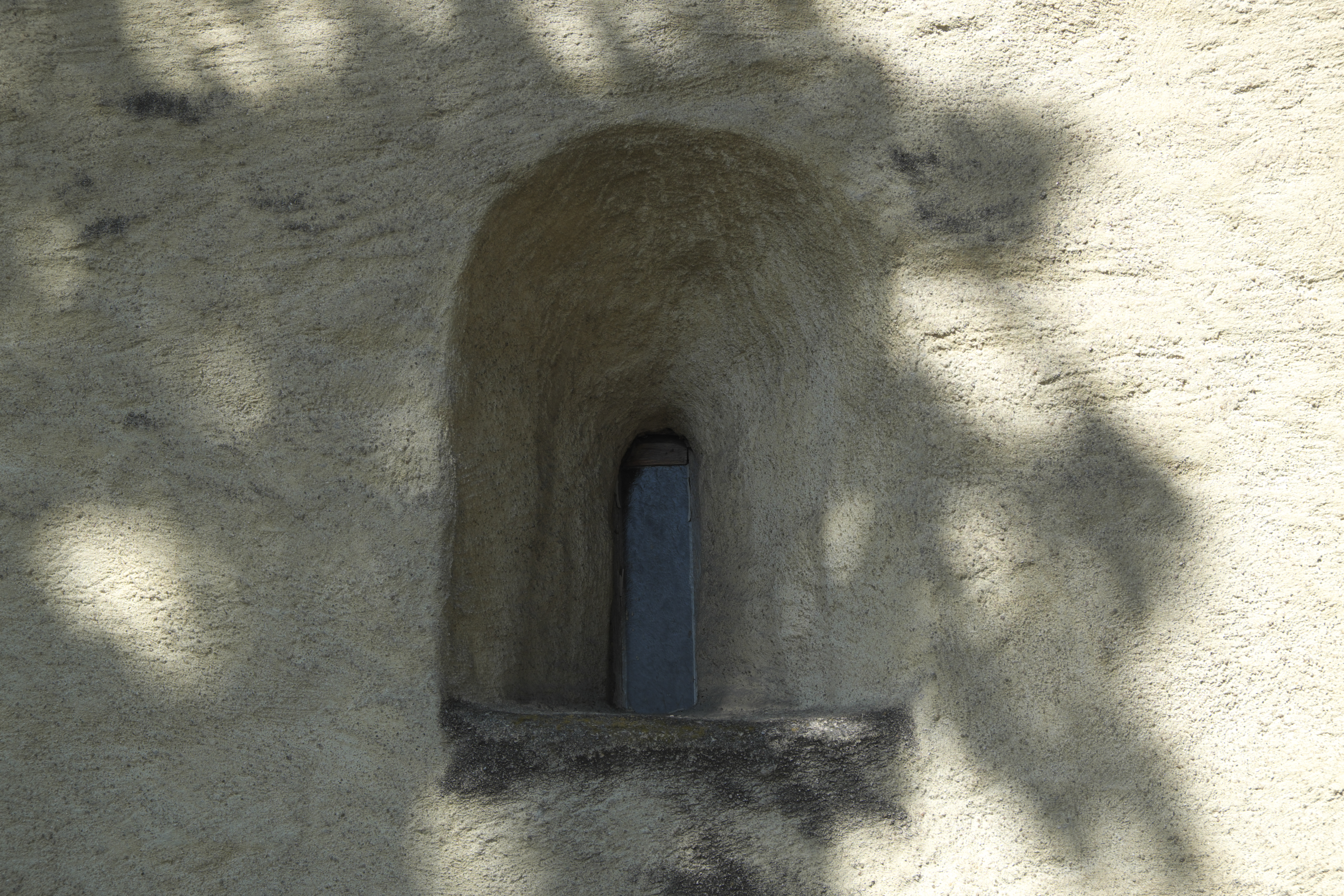 Katholische Kirche St. Nikolaus in Englschalking im Stadtbezirk Bogenhausen in München (Bayern/Deutschland)